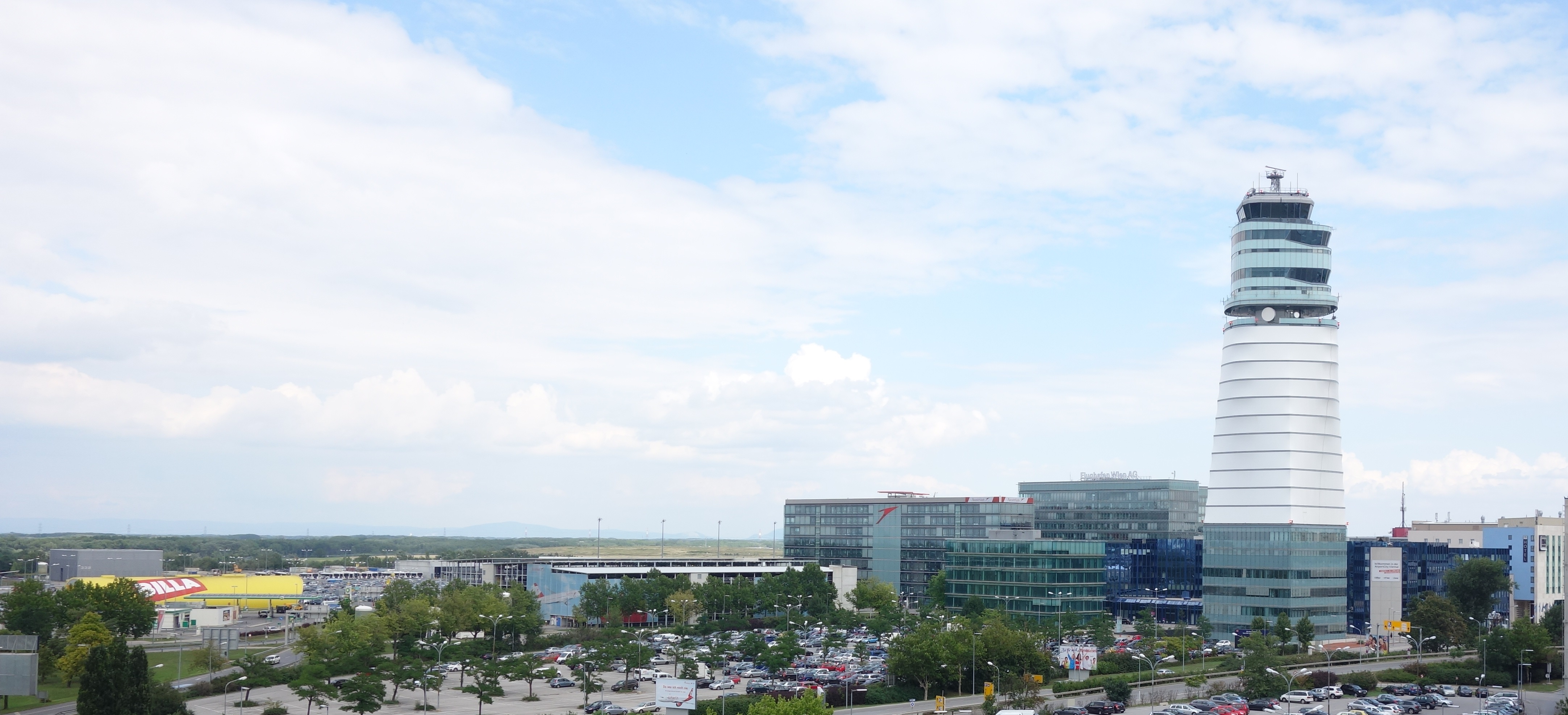 Der Kernbereich der AirportCity Vienna aus westlicher Richtung im Juli 2014. Die Gebäude v. l. n. r.: Infrastrukturgebäude Nord-Ost, Billa Supermarkt, Parkhaus 7, Office Park 2 (Austrian Airlines Headoffice), Bürogebäude Objekt 645, Office Park 1, Office Park 3, Flugsicherungsturm, NH Hotel.